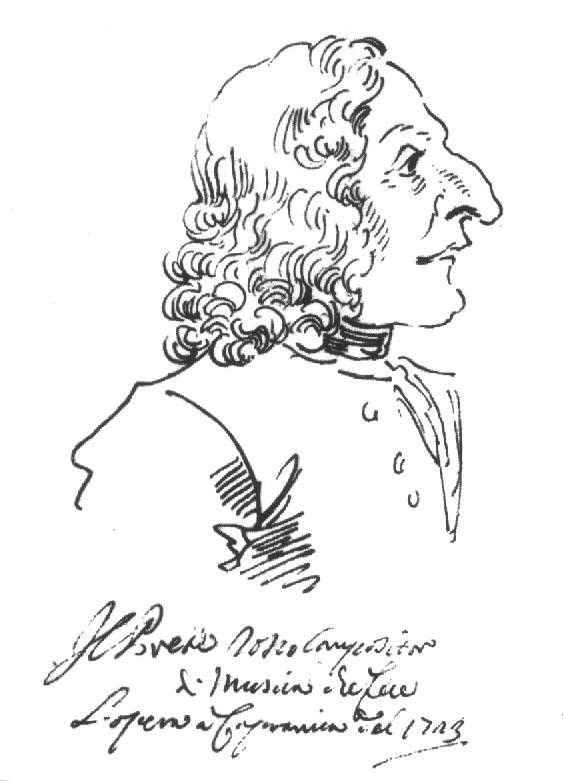 Antonio Lucio Vivaldi